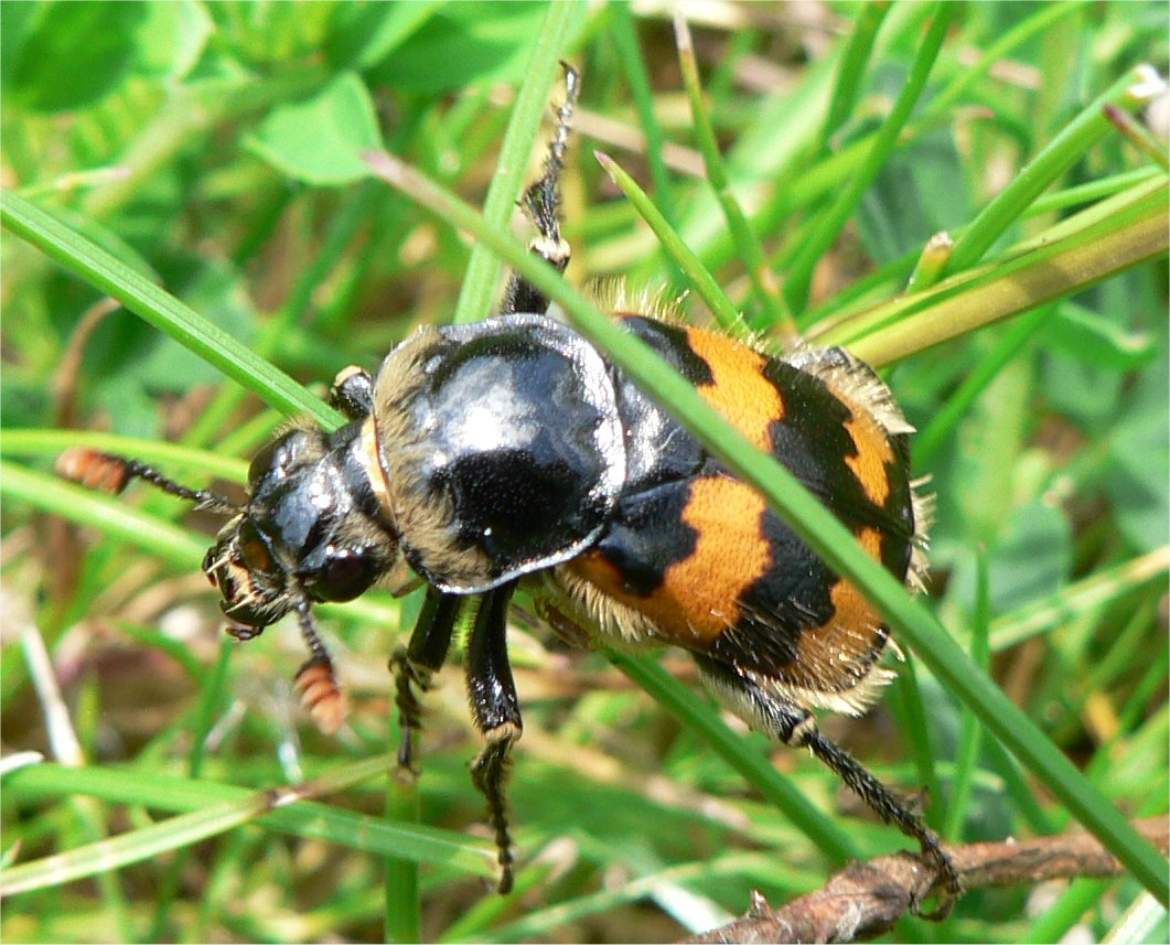 Nicrophorus vespillo, Fort III, Borsbeek, Antwerpen, Belgium